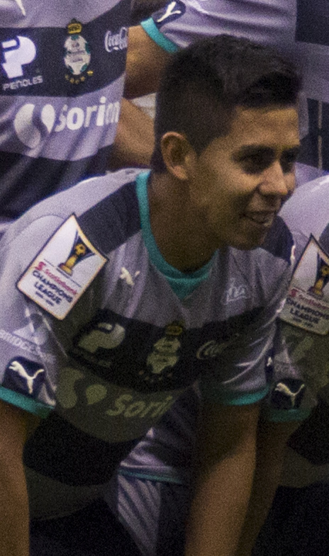 América vs Santos